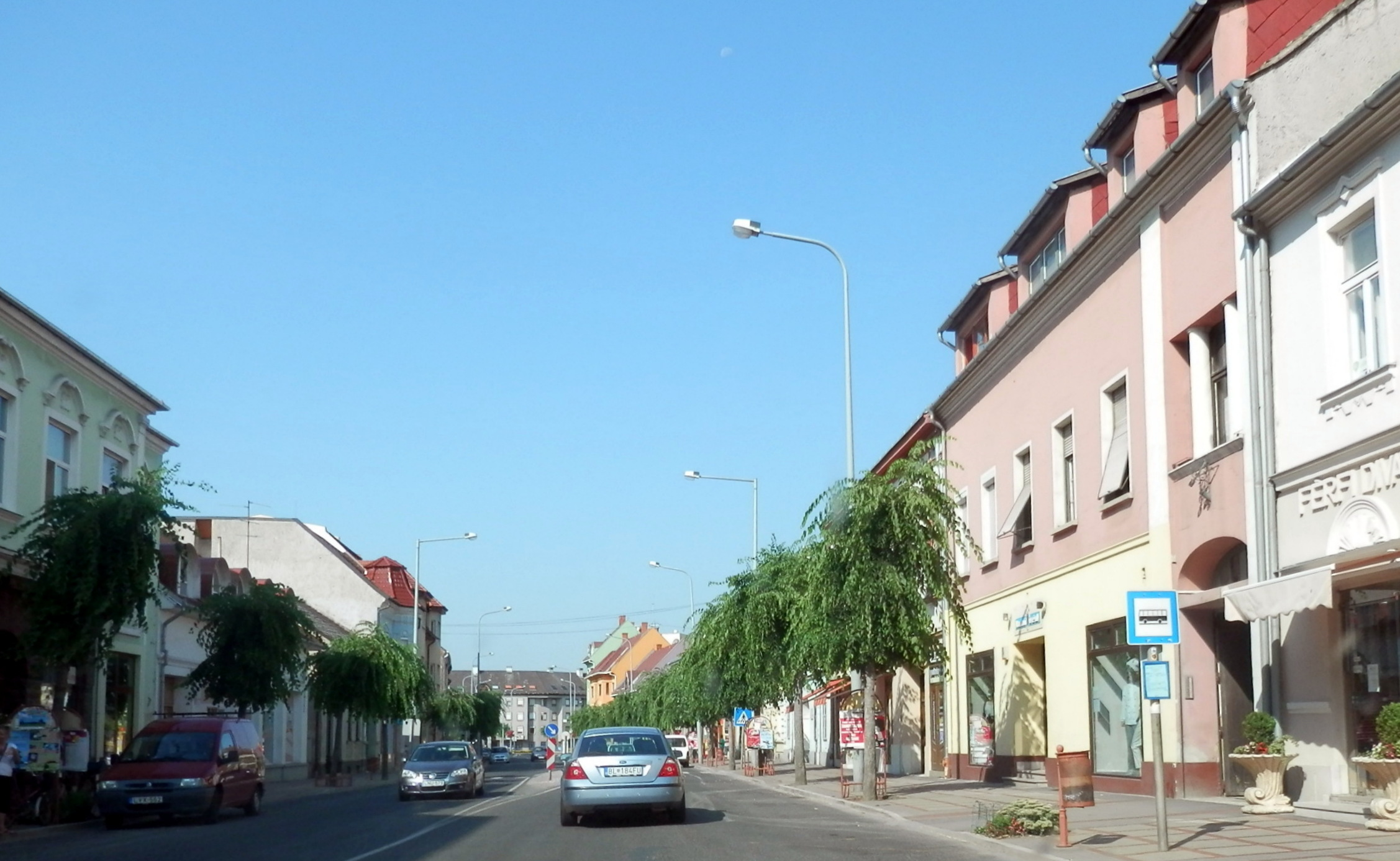 Mestečko Sárvár. Maďarsko, leto 2013.